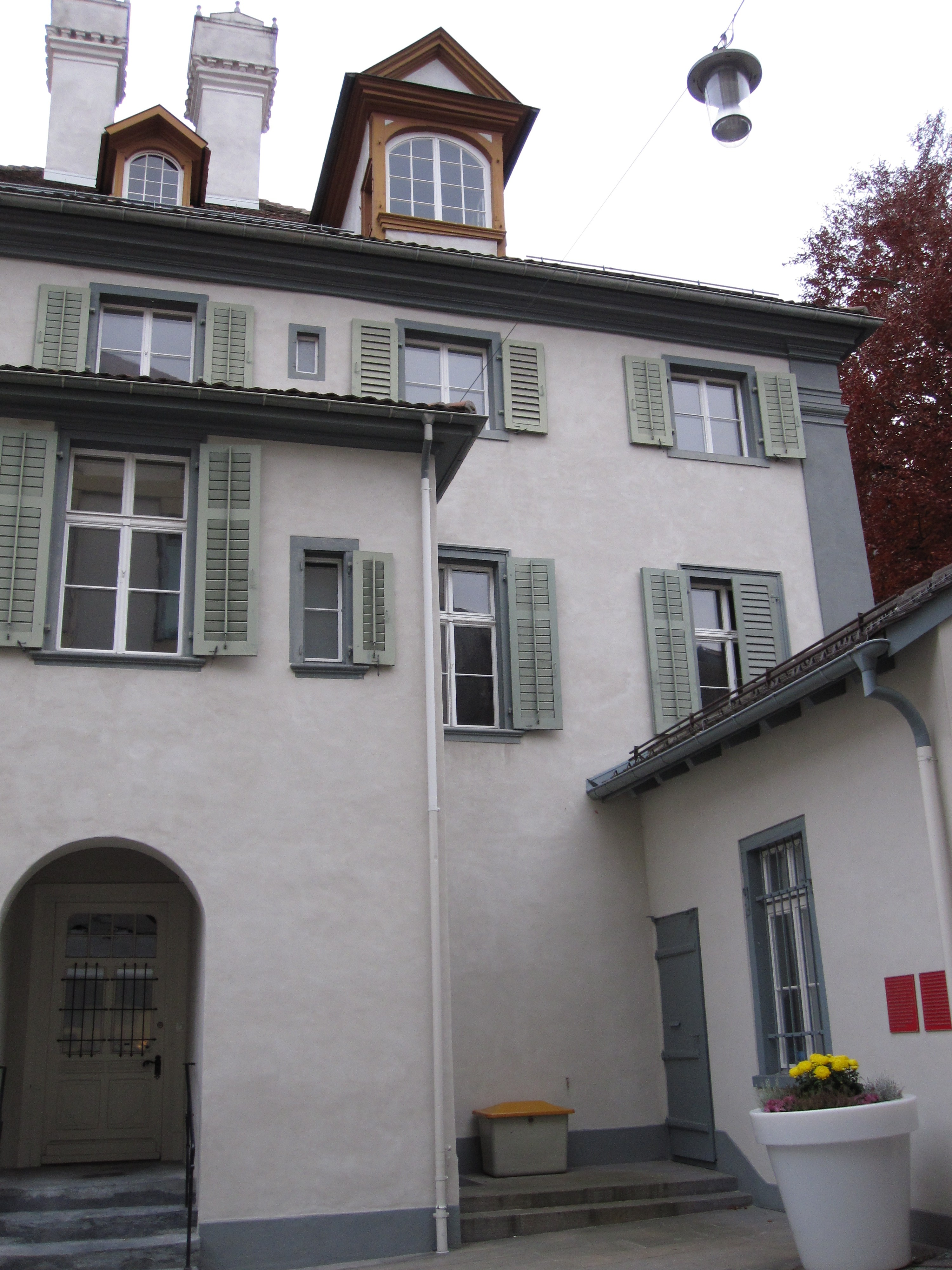 ehemaliges Gastlokal "Zum Staubigen Hüetli" in Chur, Ort der Ermordung des Georg Jenatsch